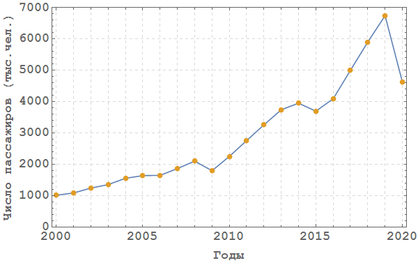 Динамика пассажиропотока через аэропорт Толмачёво (Новосибирск)